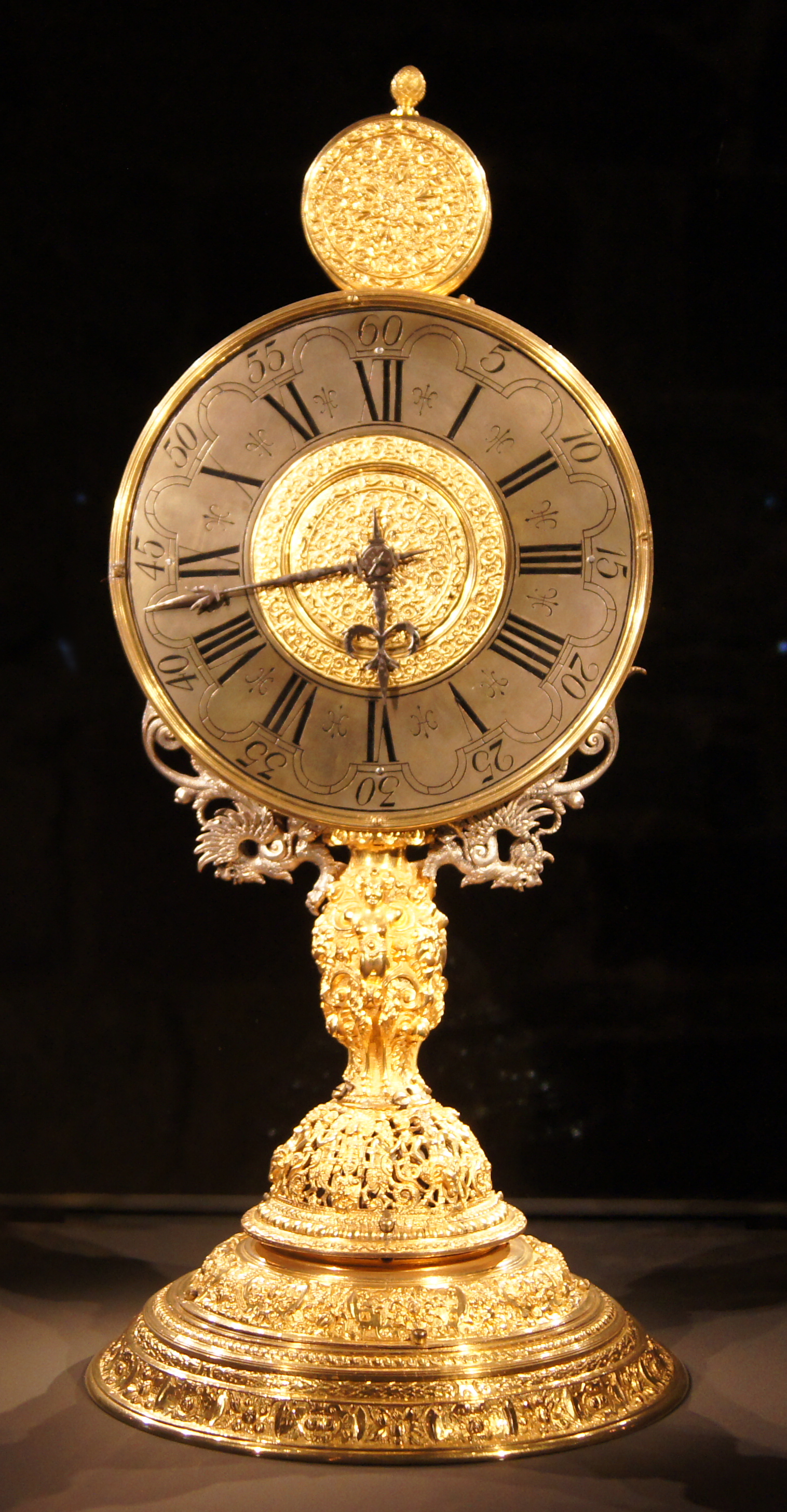 Tischuhr (Monstranzuhr), Caspar Rauber (?), Augsburg, 1572; Exponat in der Prunkuhrensammlung im Landesmuseum Württemberg, Stuttgart